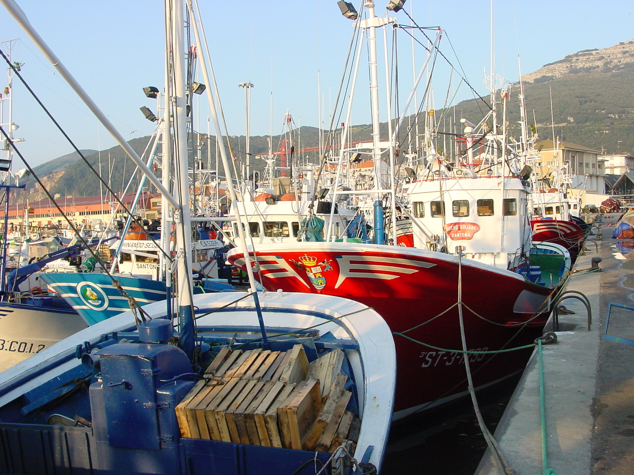 Santoña (Cantabria, España). Actividad en el puerto pesquero, muelle norte.